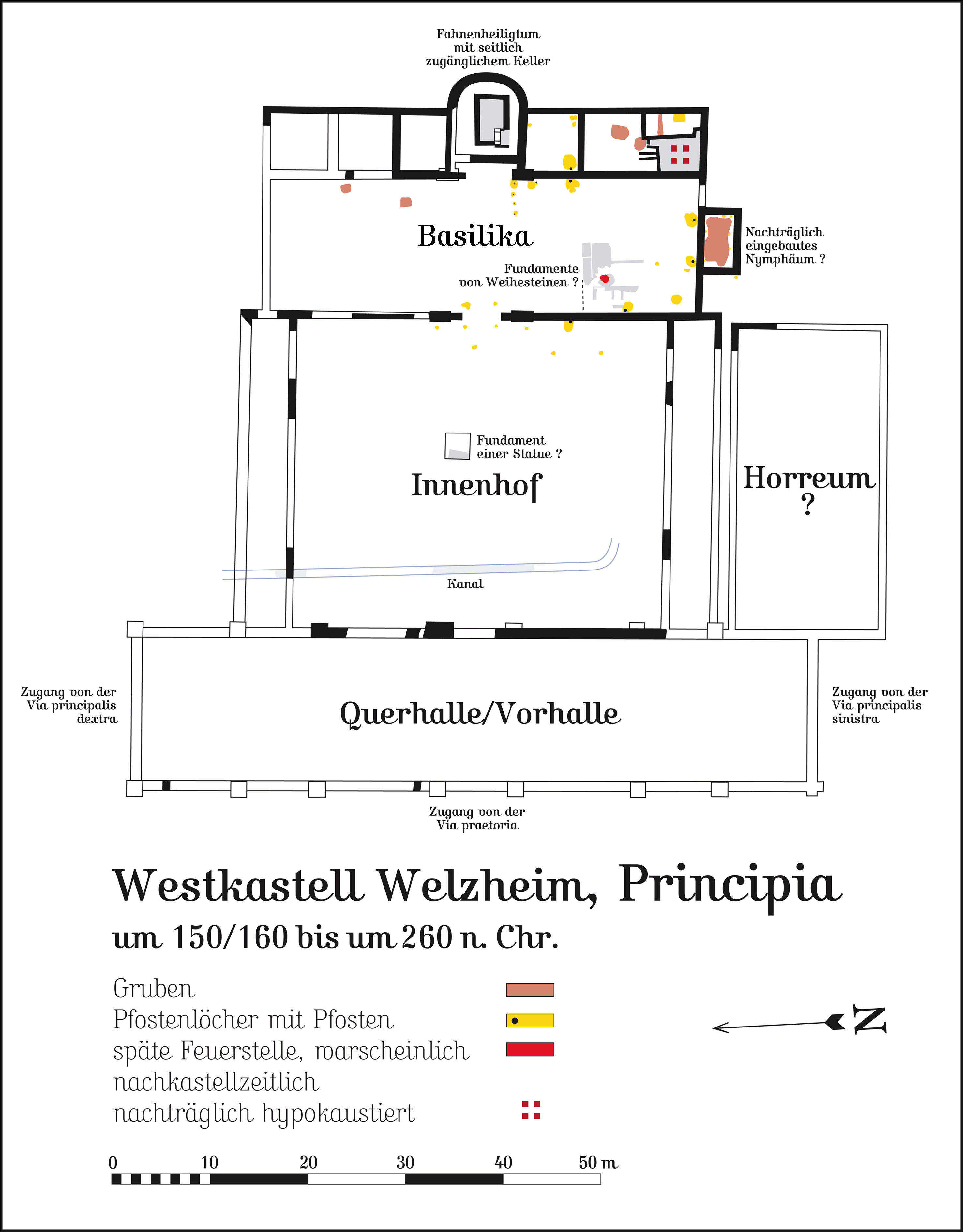 Principia im Westkastell Welzheim am Limes, Baden-Württemberg. Hergestellt am Macintosh unter Macromedia Freehand MX; abgespeichert für Wikipedia unter Adobe Photoshop CS 2.